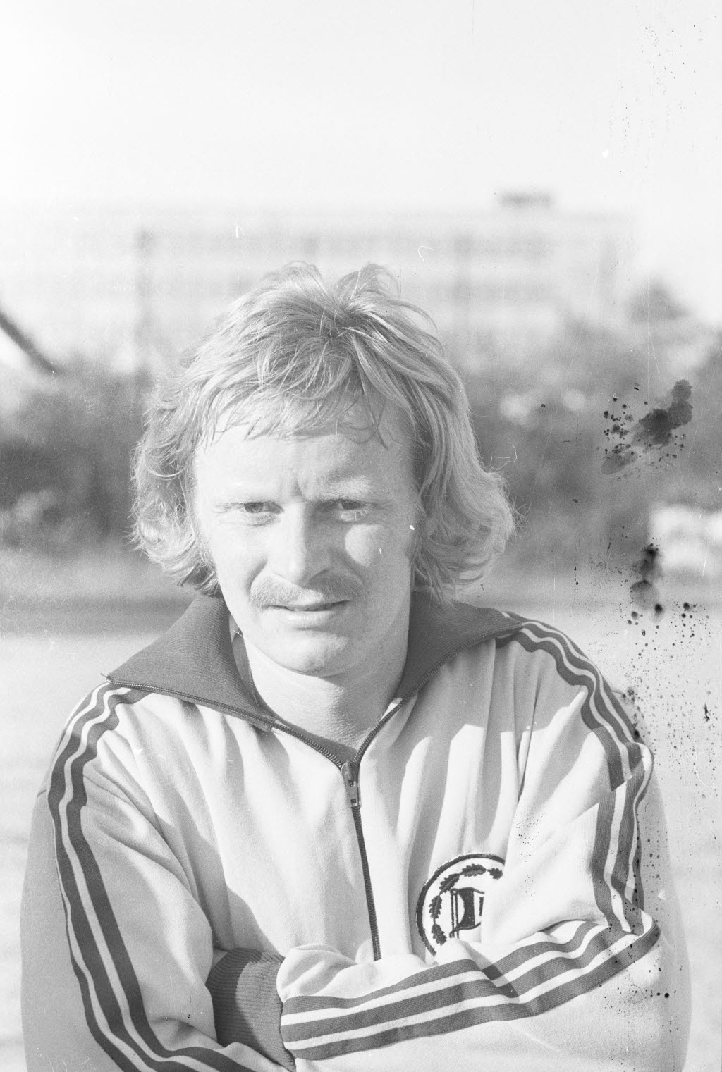 Der Mittelfeldspieler wechselte zur Saison 1974/75 von Arminia Bielefeld zu Holstein Kiel.